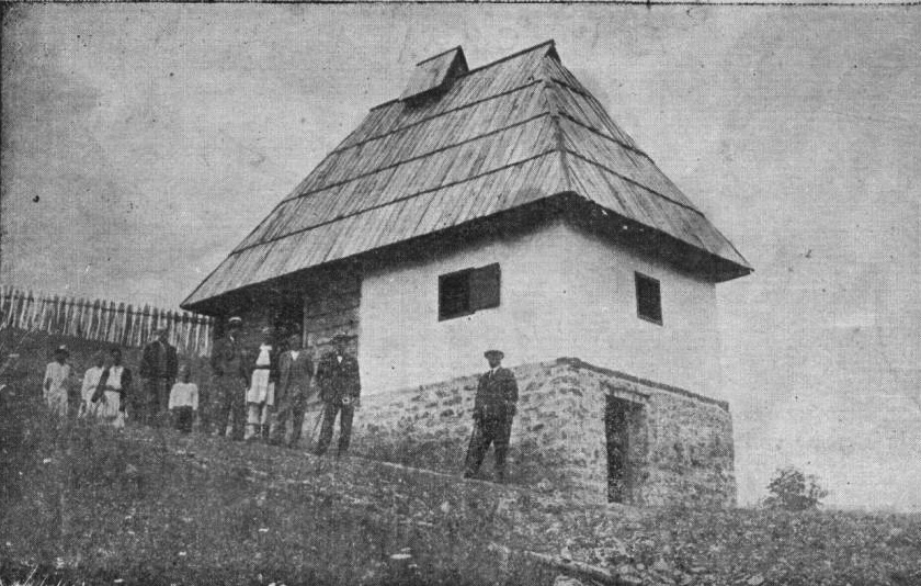 „Дописна карта“ са сликом Вукове куће у Тршићу